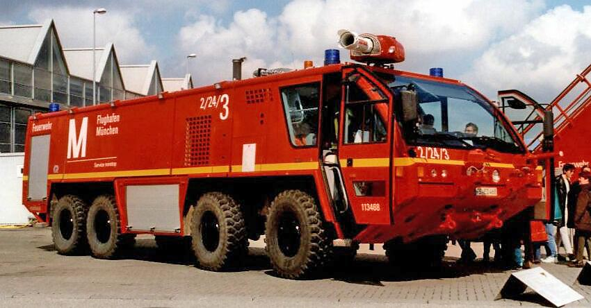 Flugfeldlöschfahrzeug (Rosenbauer Panther 8x8) der Feuerwehr Flughafen München Fotografiert im März 2001 Kategorie:Feuerwehrfahrzeug